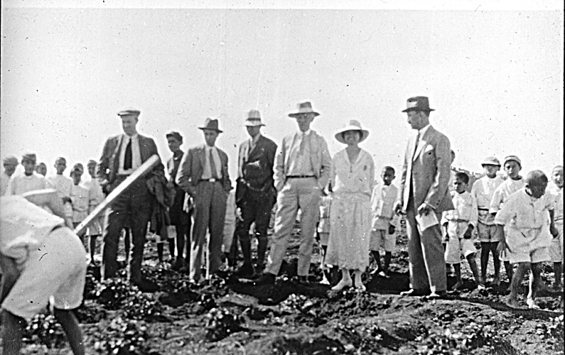 RA/PA-0750/Gk/0001 1119